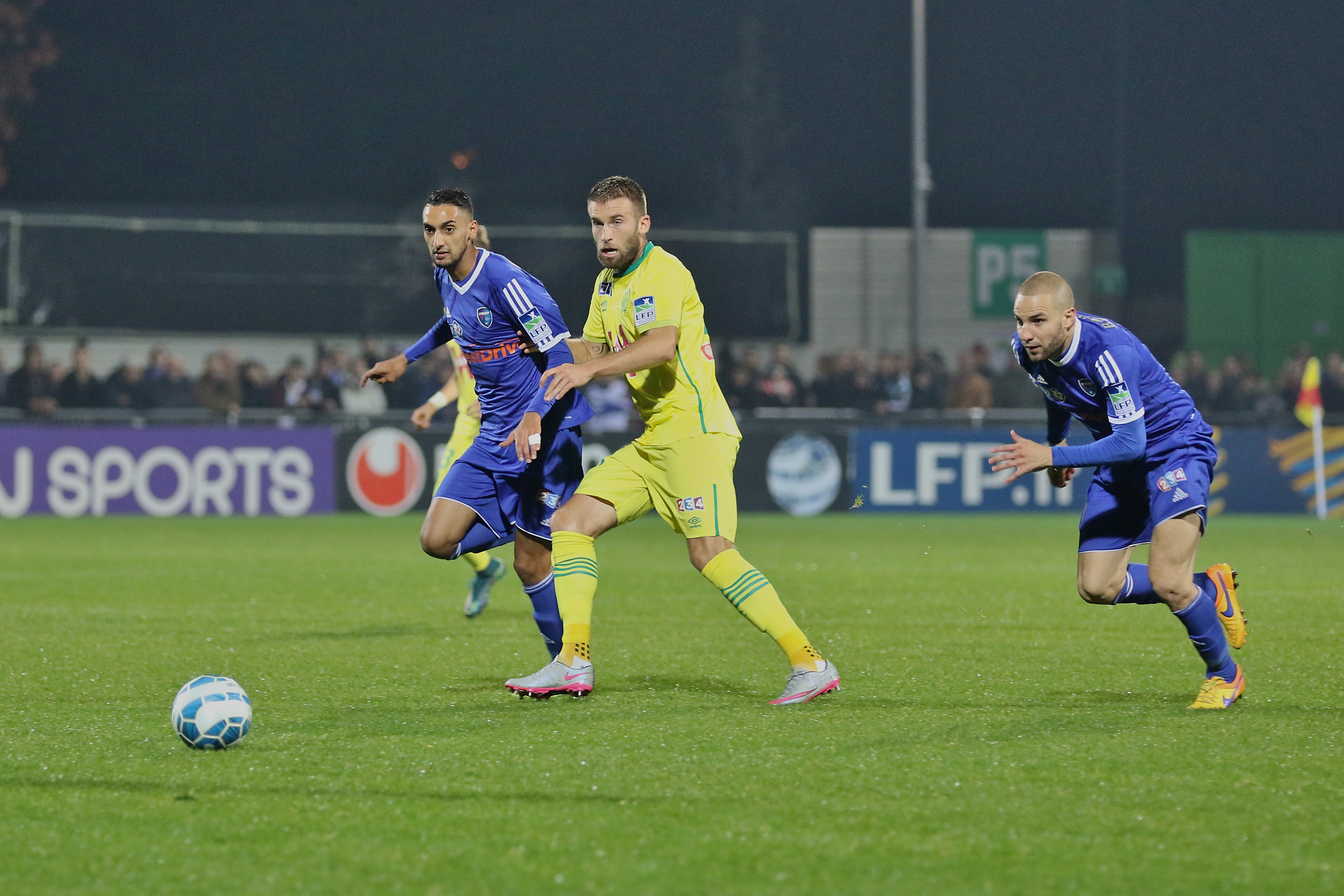 FBBP01 - FCN - 20151028 - Coupe de la Ligue - Rafik Boujedra, Lucas Deaux et Lakdar Boussaha